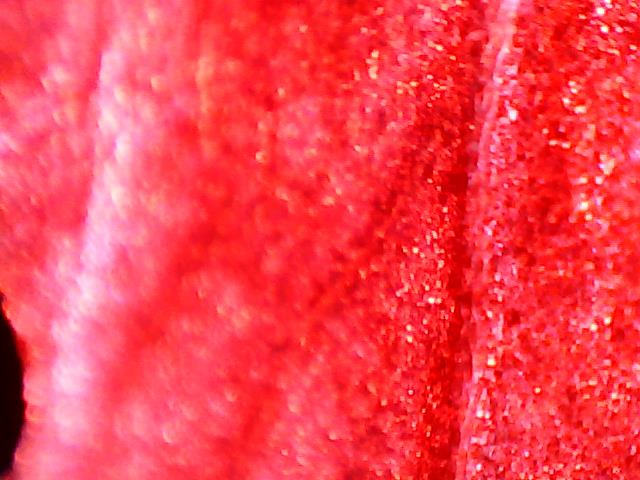 petalo de Rosa china